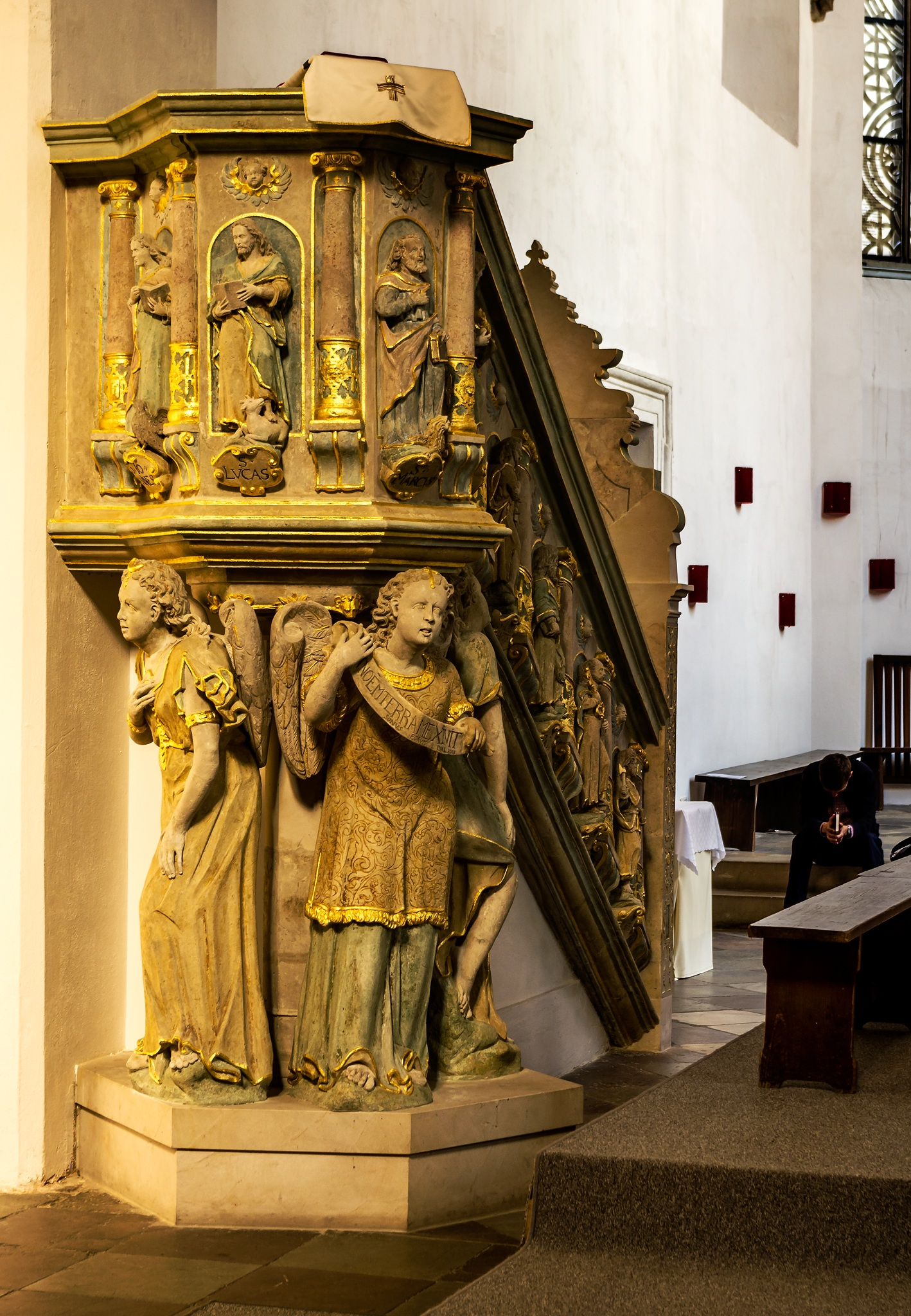 Kościół Św. Macieja - wnętrze